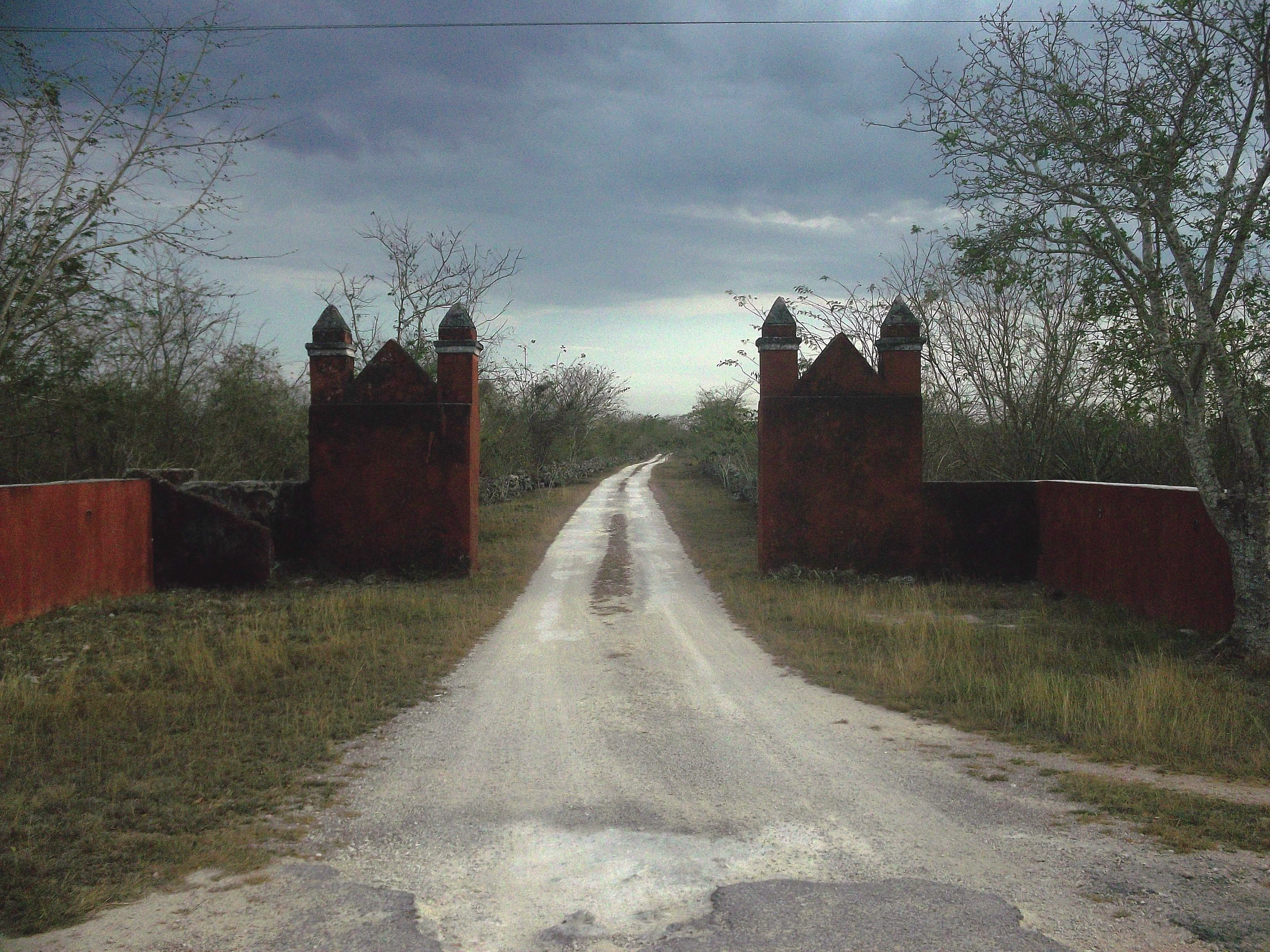 Entrada a Santa María, Yucatán.